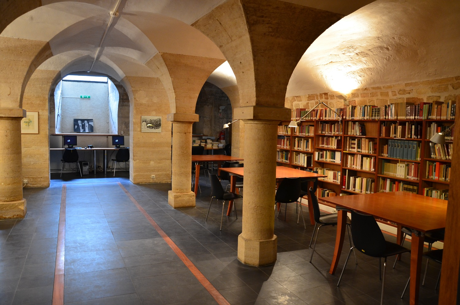 Bibliothèque de l'Institut Culturel Italien de Paris